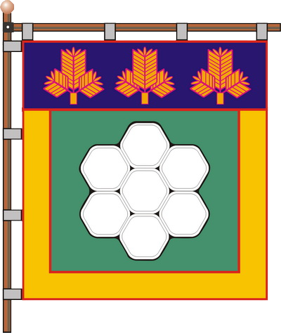 Прапор міста Нетішин